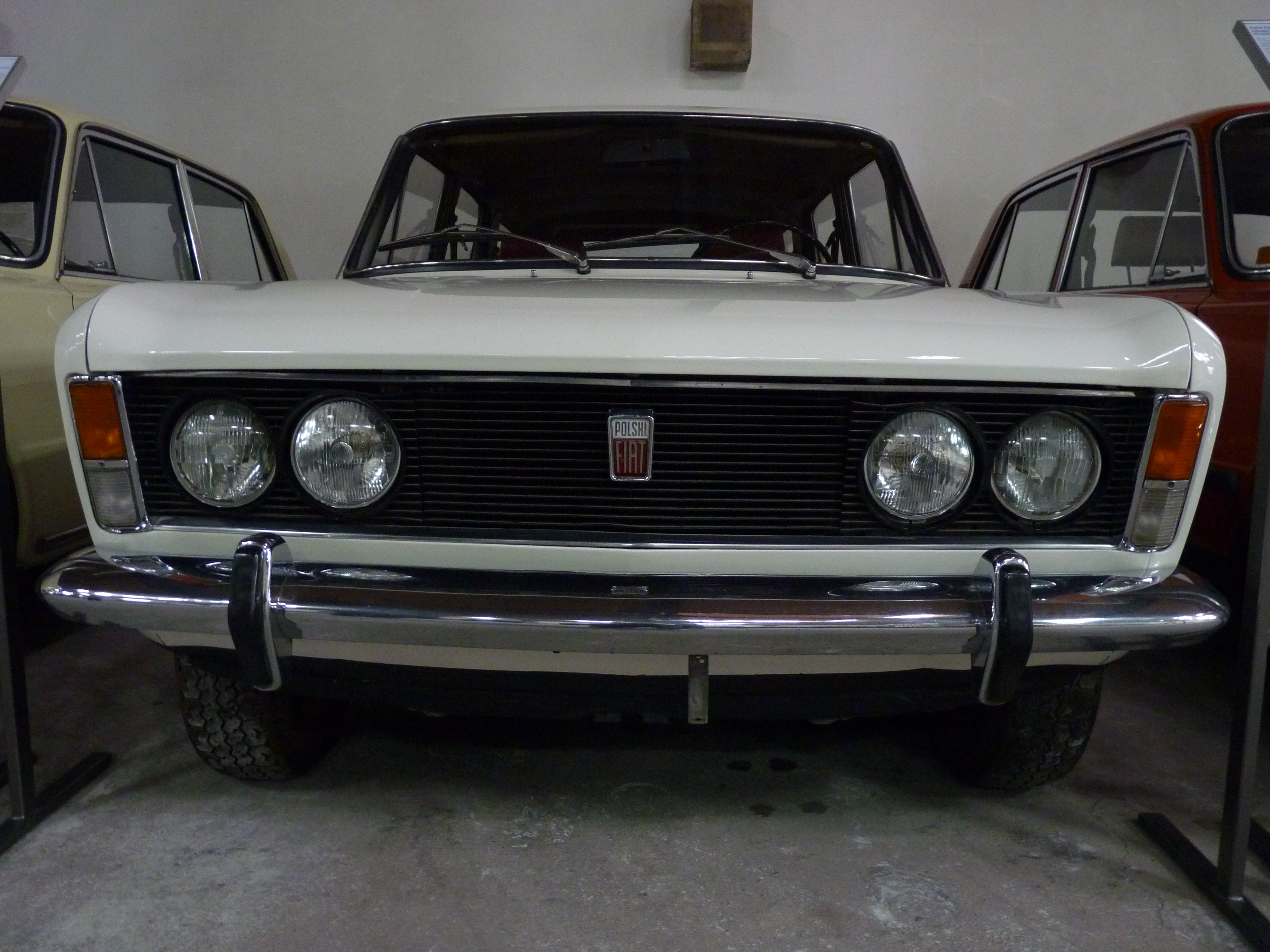 Polski Fiat 125p Kombi MR'73 1500 at the Muzeum Inżynierii Miejskiej in Kraków.JPG